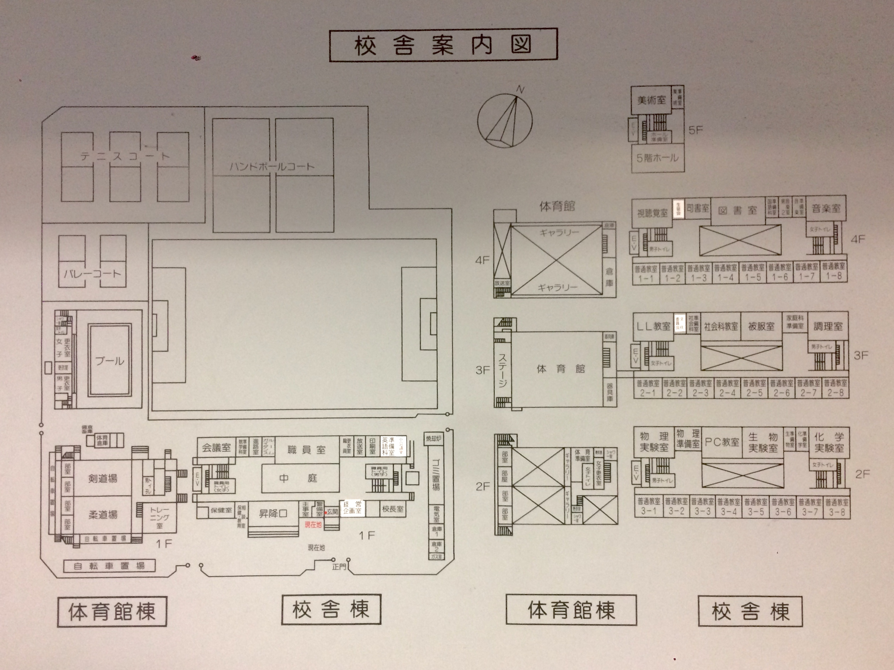 2018/8/24 東京都立八王子東高等学校職員玄関にて